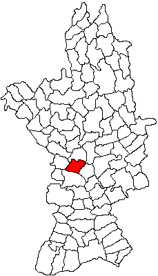 Categorie:Hărţi ale judeţului Olt